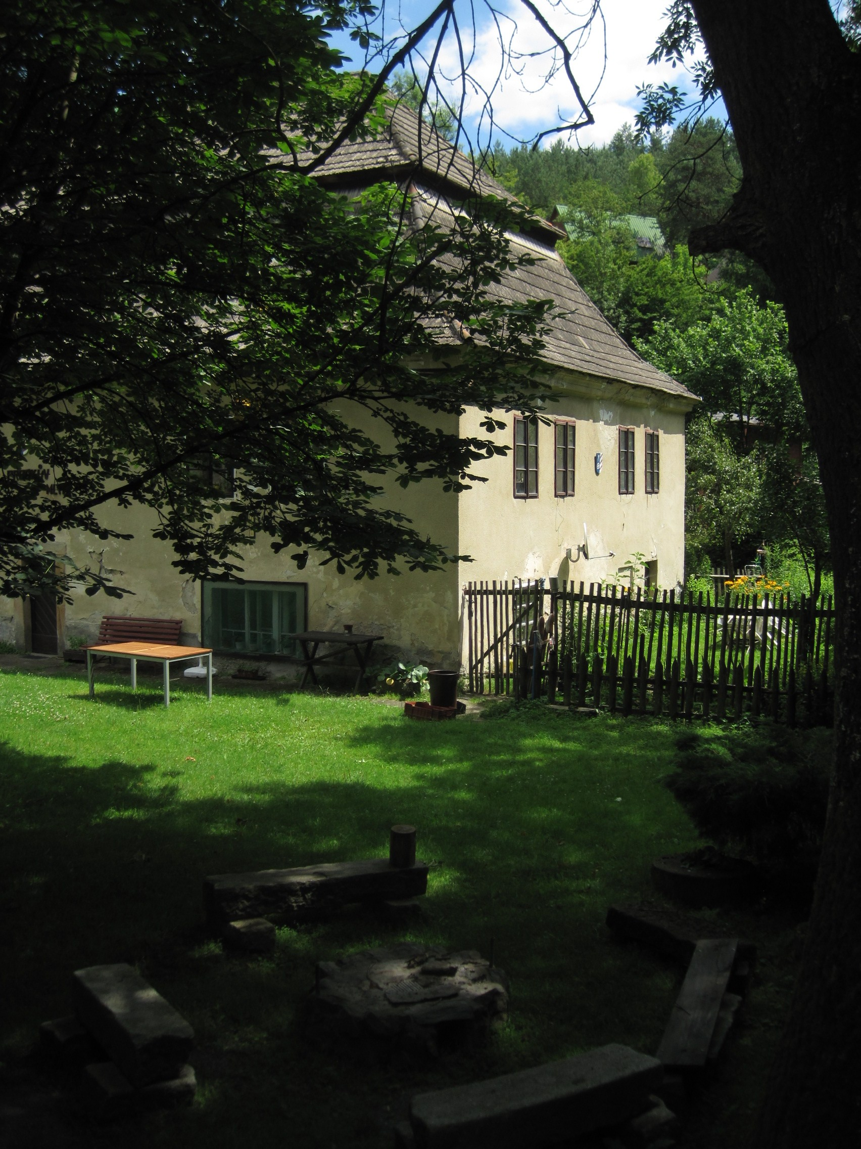 Proškův mlýn, Malé Kyšice 6, osada Poteplí, Malé Kyšice.